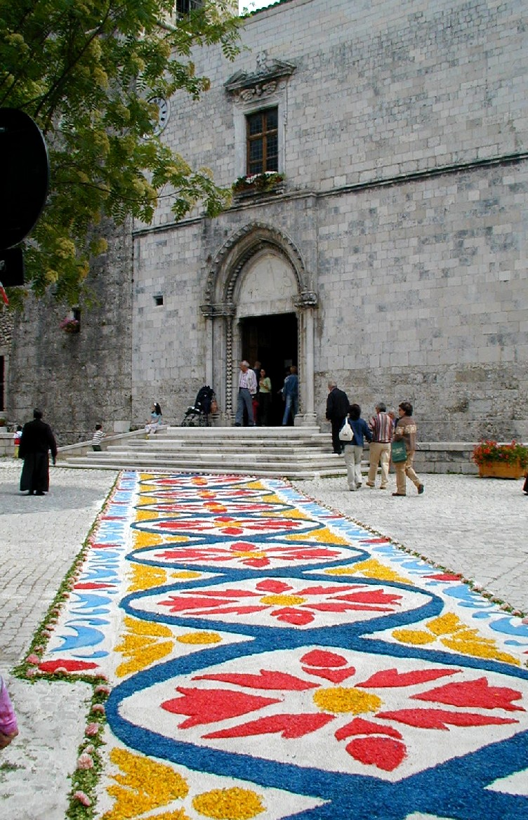 Pescasseroli - l'Infiorata